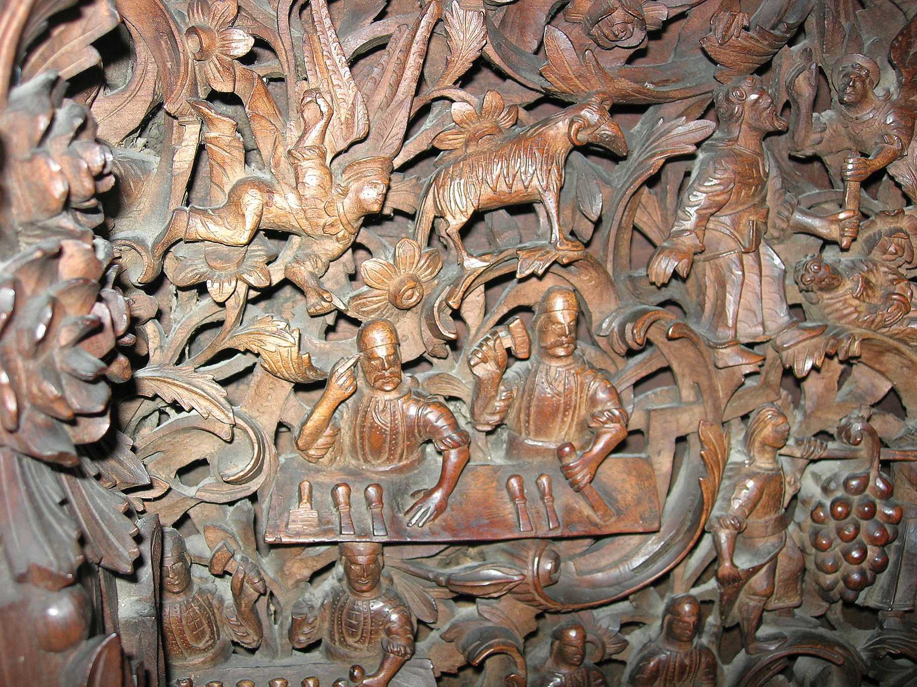 Дел од иконостасот од Бигорскиот Манастир